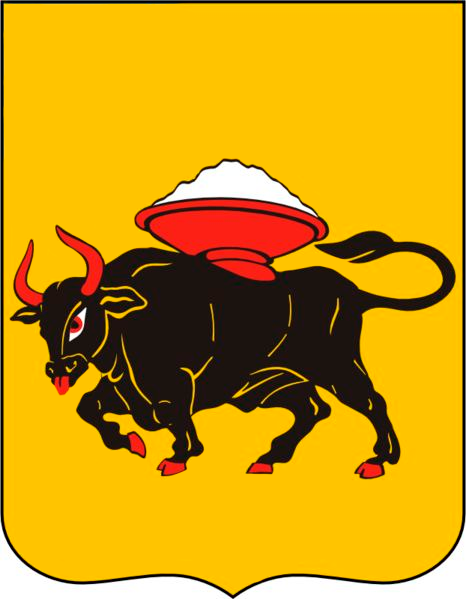 Герб міста Енгельса без герба Саратовської області у вільній частині.